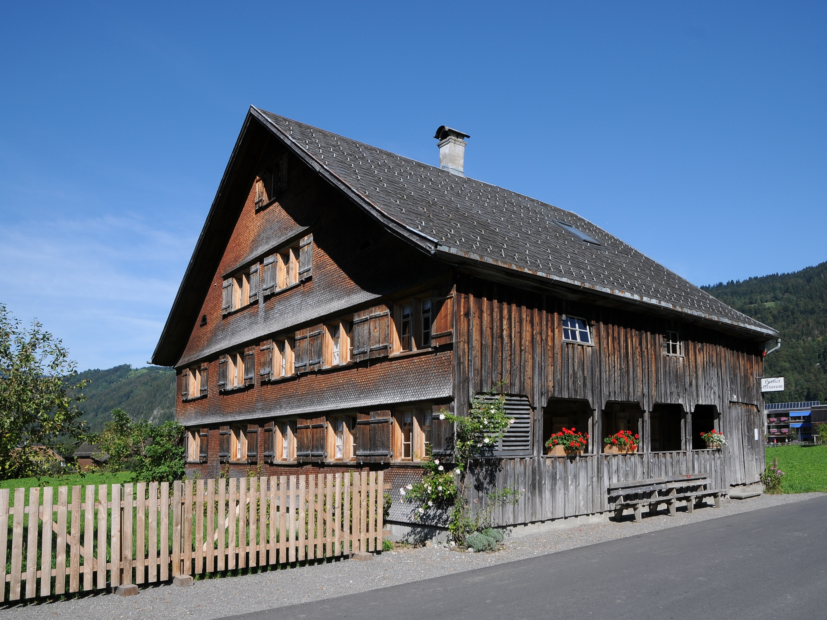 aus dem DEHIO Vorarlberg 1983: HEIMATMUSEUM Ellenbogen 181 in Bezau. Bauernhof des 18. Jhs., 2geschossiger verschindelter Blockbau, Giebelgeschoß, traufseitig Schopf, Flurküche, offener Kamin, Lehmofen in der Stube. Reiche volkskundliche Sammlung, Objekte vom 15. bis 19. Jh., Galerie bedeutender Bregenzerwälder. *** Das Haus steht unter Denkmalschutz.